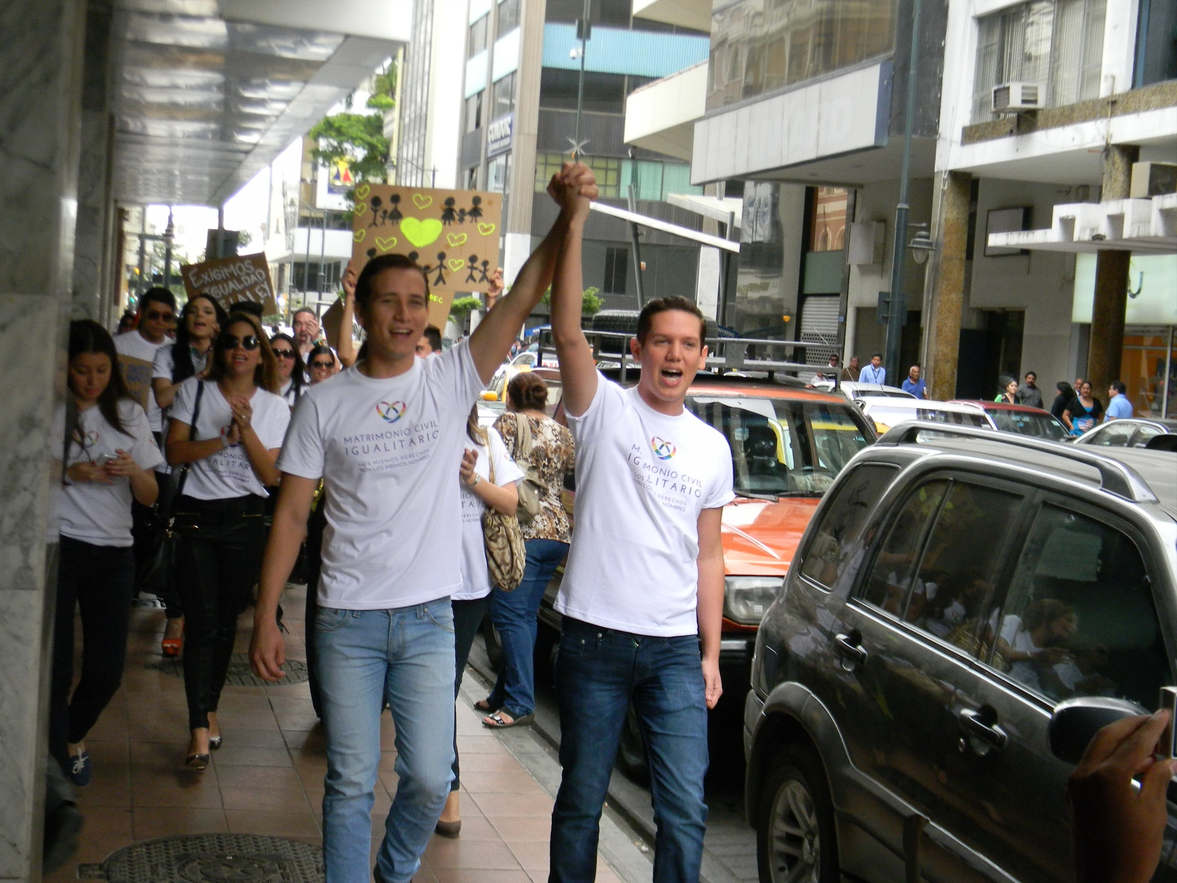 Fernando Saltos (izquierda) con Santiago Vinces de camino al Registro Civil.